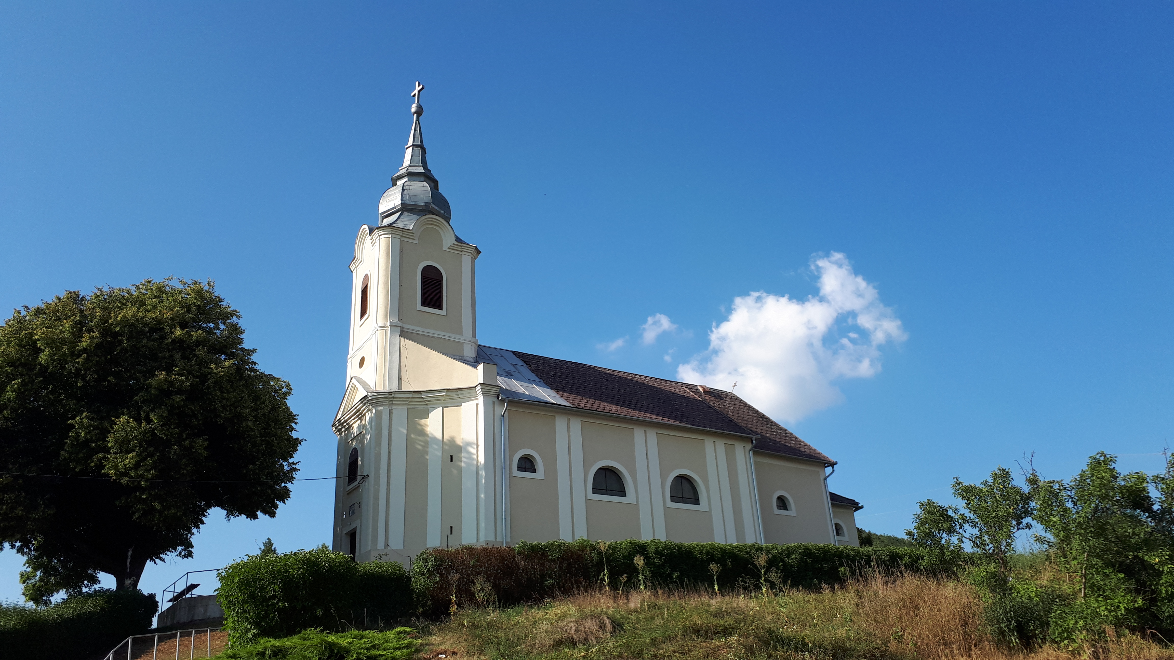 Szendrőlád, Szűz Mária szent neve katolikus templom